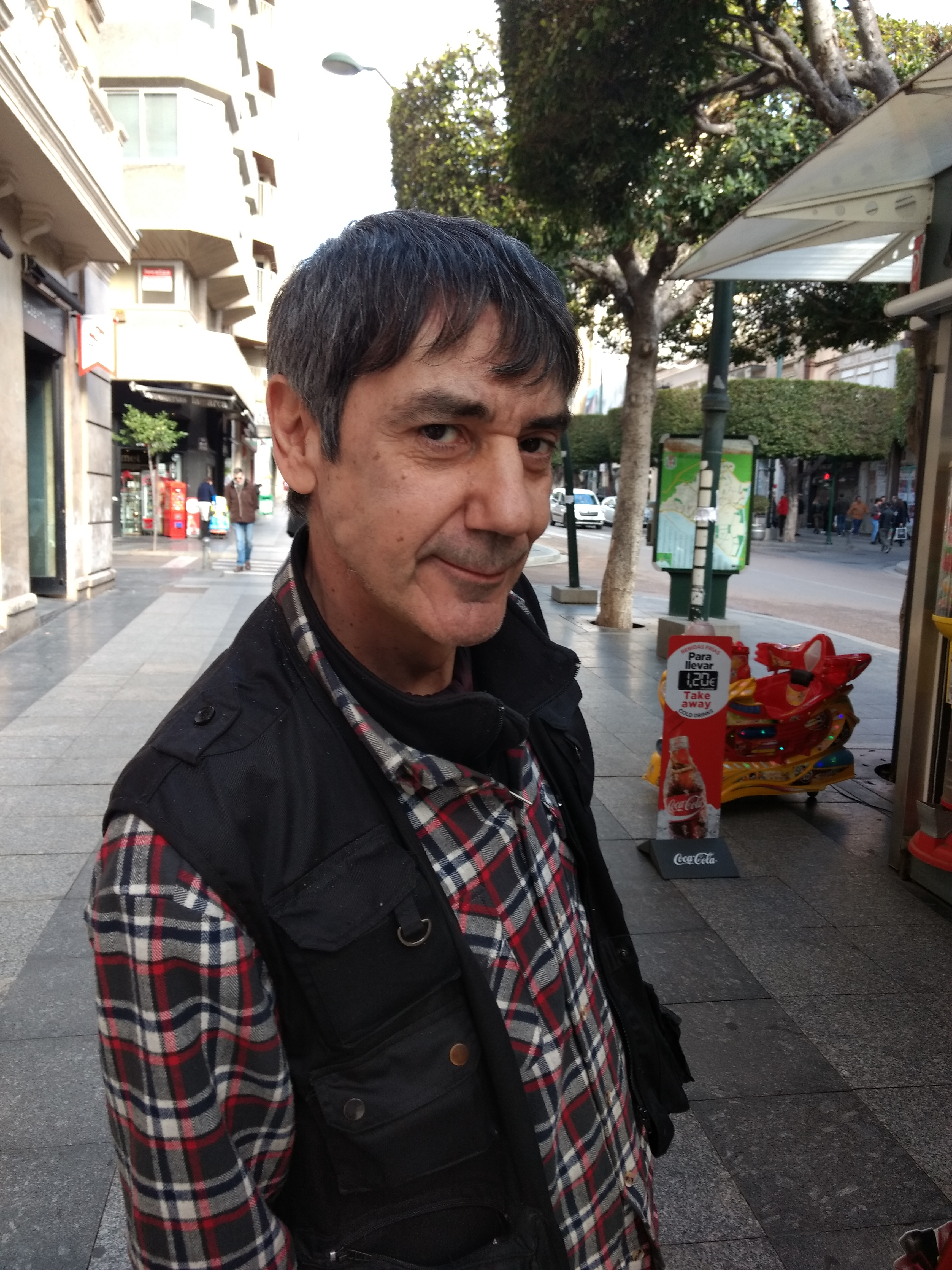 Retrato de Juan Carlos Arroyo Urbina, conocido artísticamente como Carlos Faemino, miembro del dúo humorístico Faemino y Cansado.